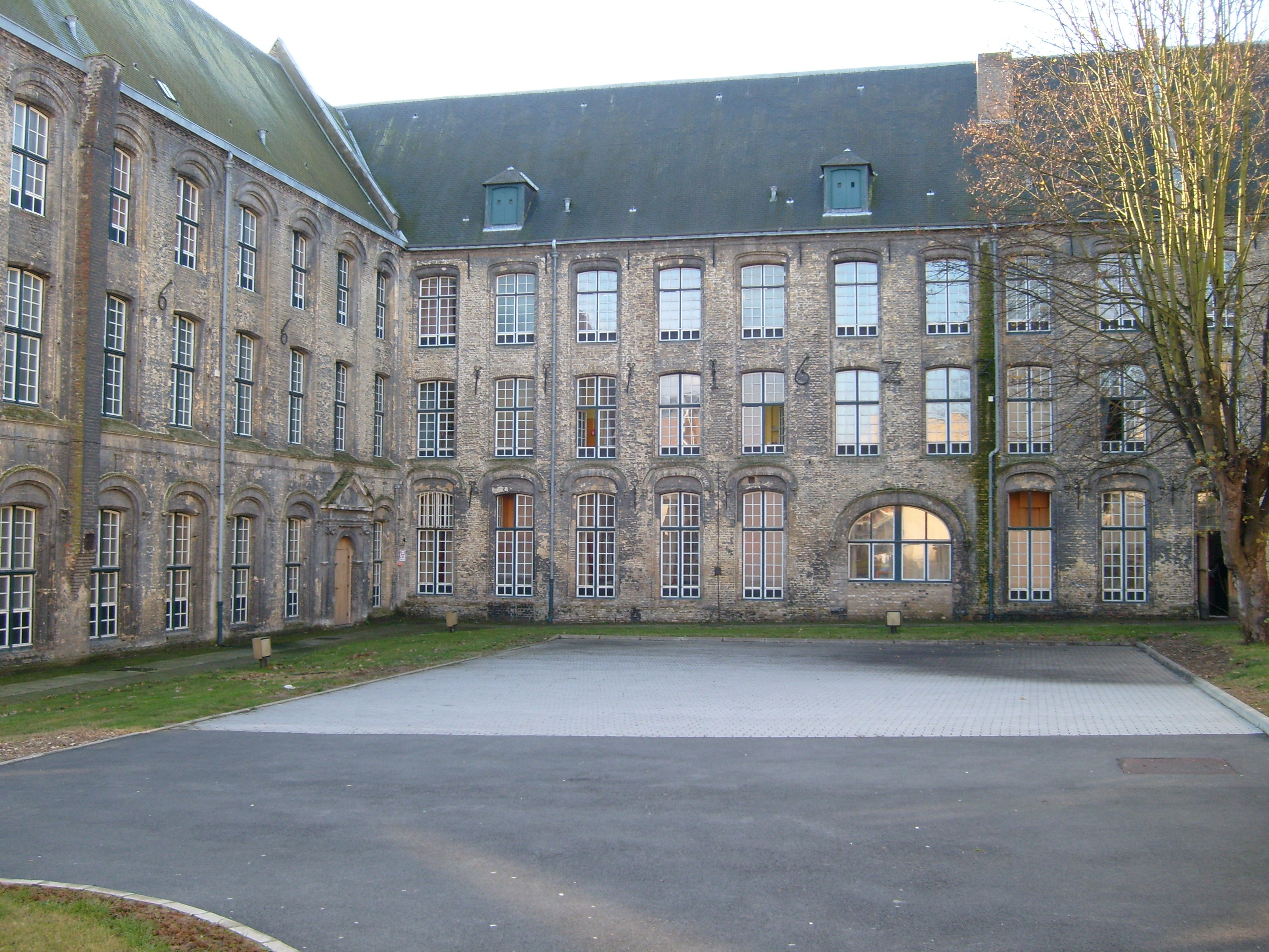 L'Internat Féminin du Lycée Alexandre Ribot, Saint Omer. Photographie prise en 2007 par moi-même.